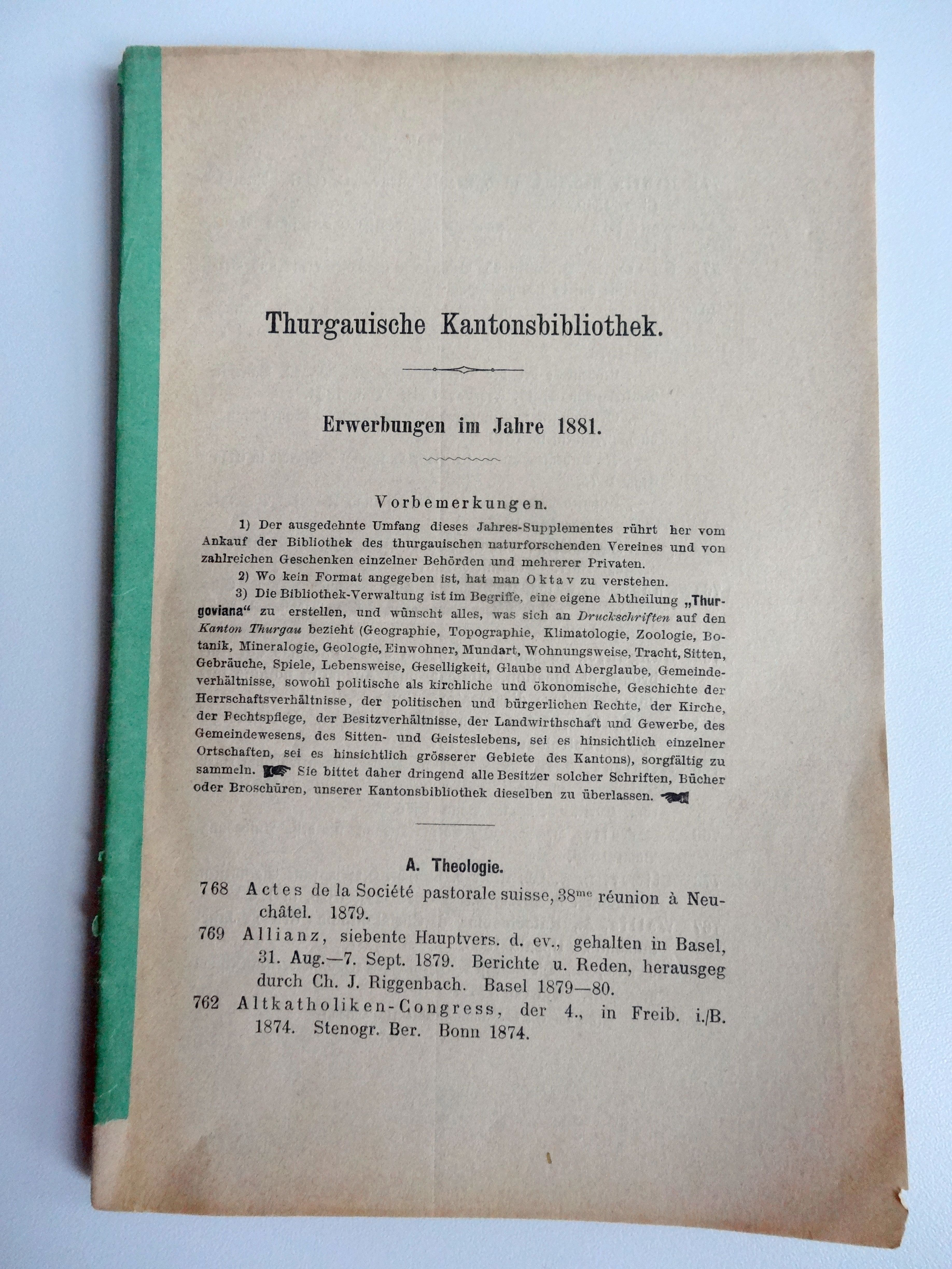 Aufruf der Bibliothek-Verwaltung der Kantonsbibliothek Thurgau zur Sammlung von Thurgoviana. Frauenfeld 1881